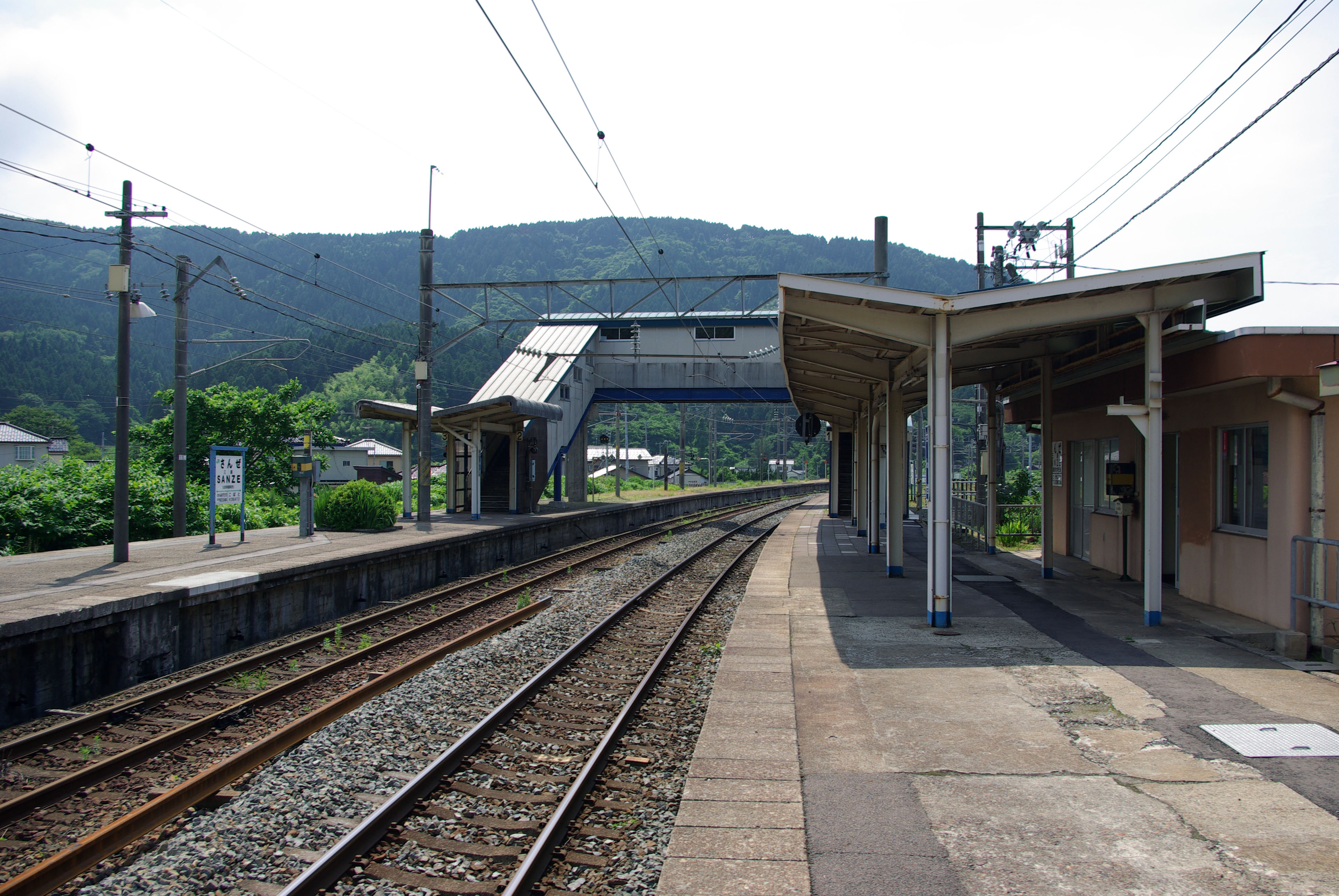 JR羽越本線三瀬駅